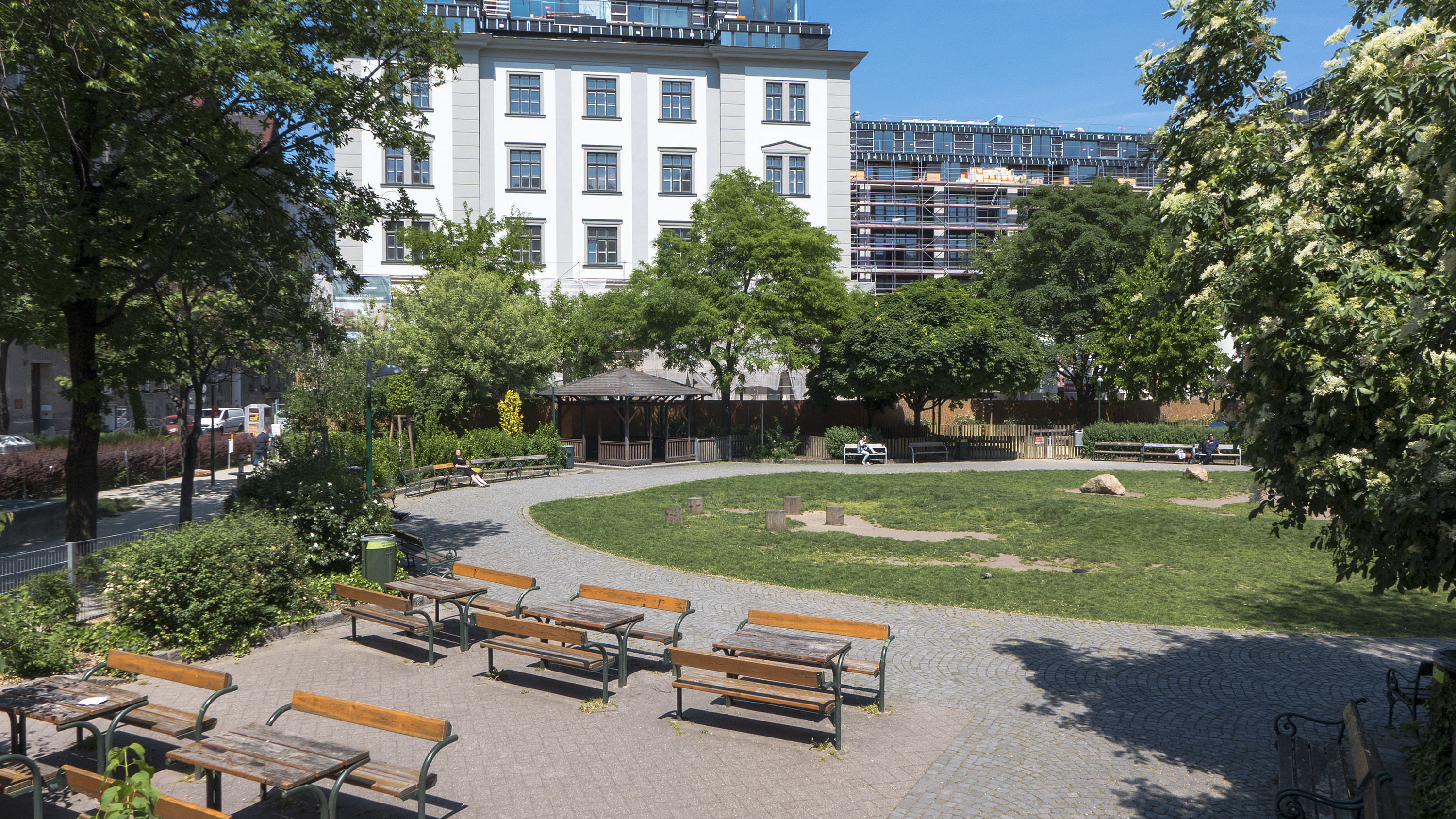 Hamerlingpark in Wien 8